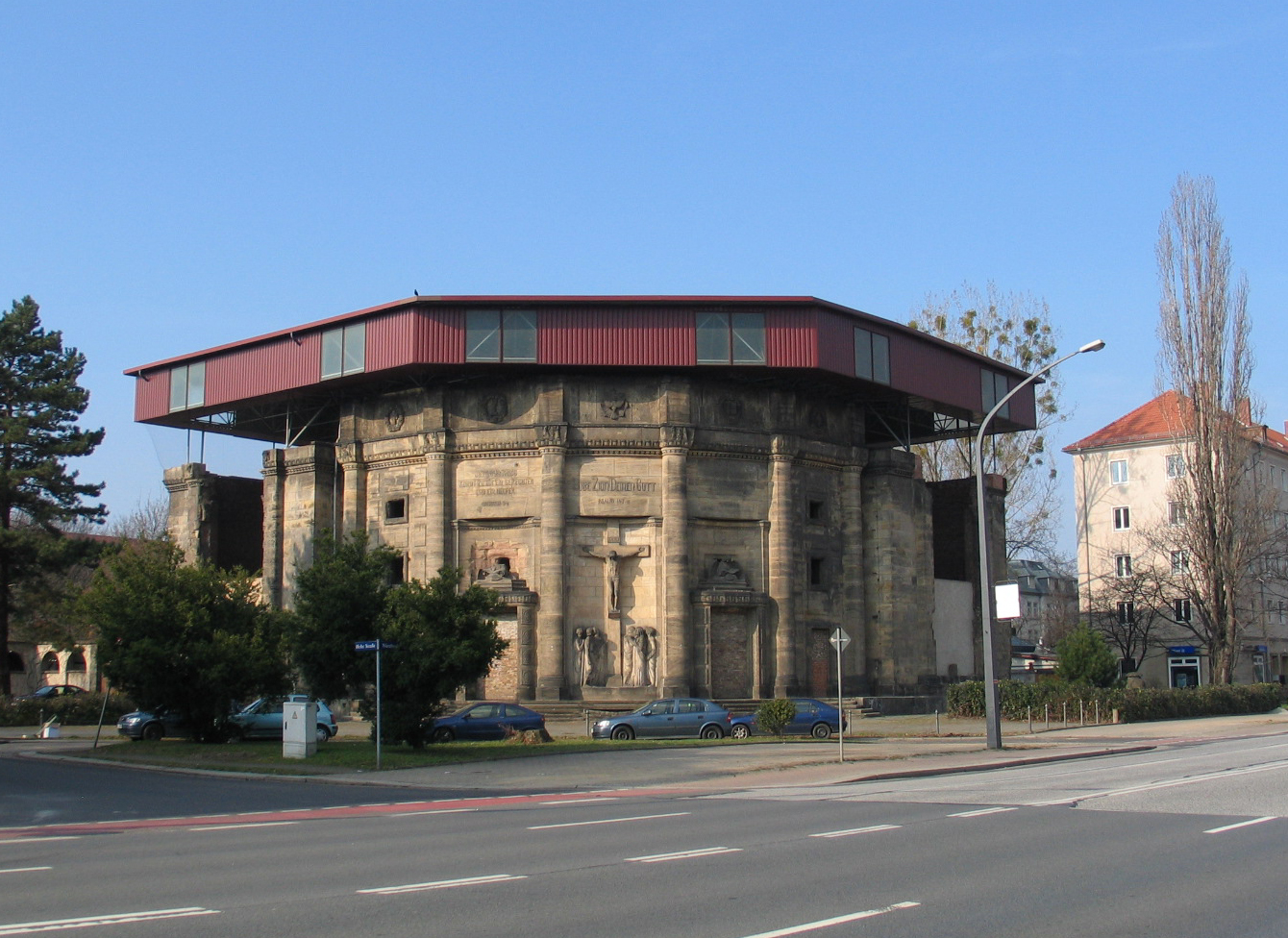 Ruine der Alten Zionskirche an der Nürnberger Straße in der Dresdner Südvorstadt